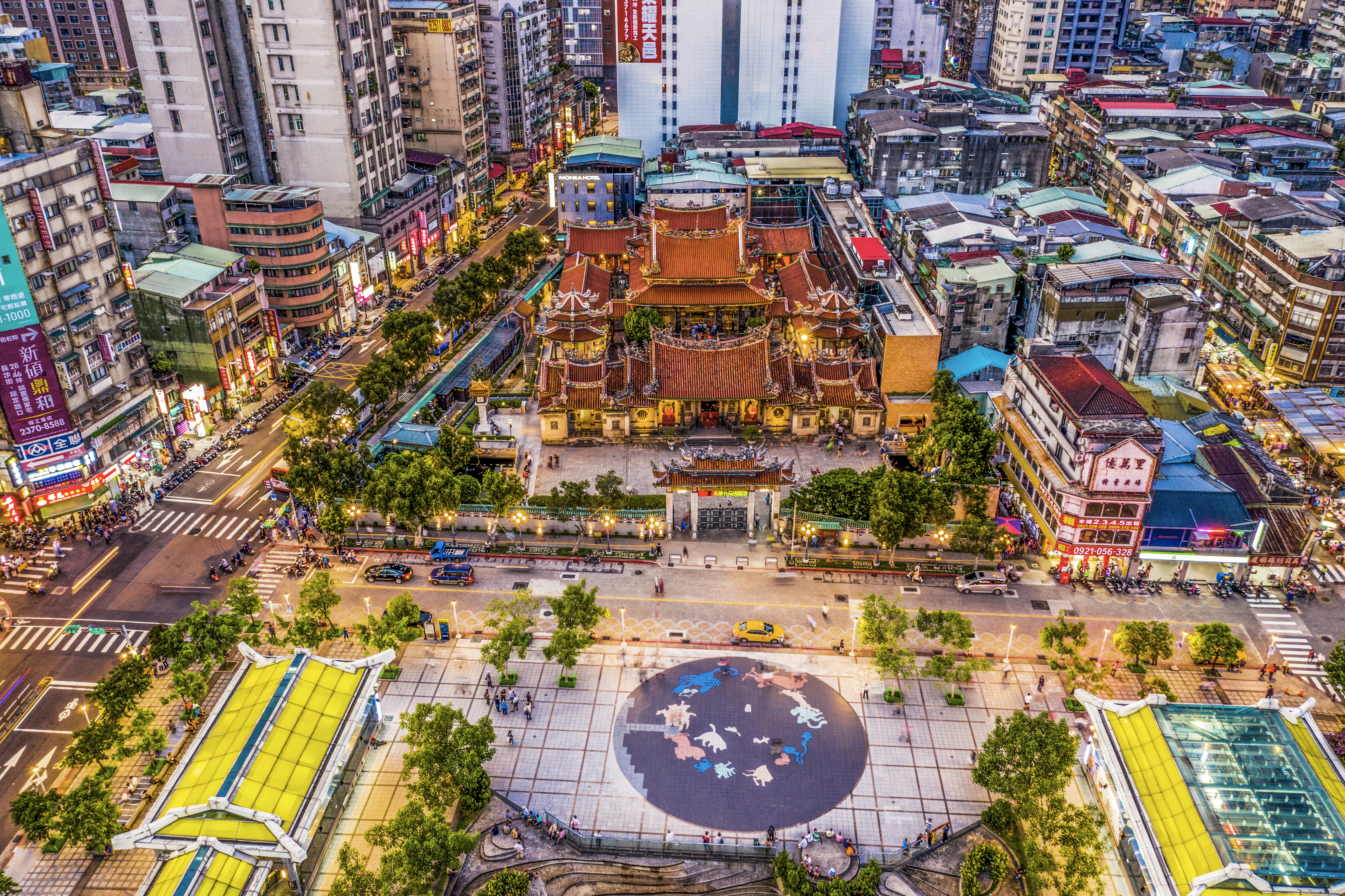 中文（台灣）: 廟前即是廣州街與艋舺公園,下通捷運站,廟左為西園路,廟左有青草巷.